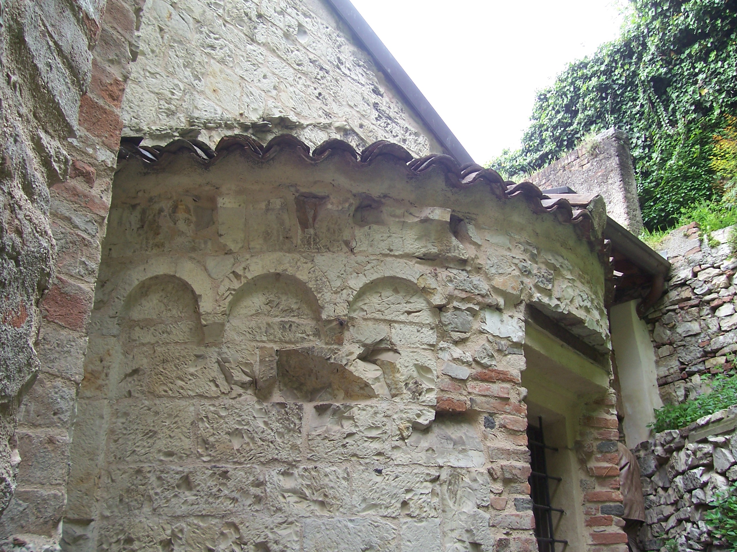 san giorgio (brescia) abside1.jpg